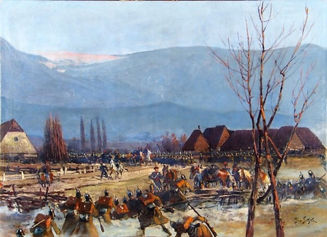 Panorama Siedmiogrodzka fragment